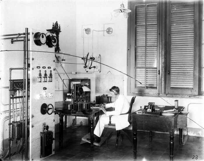 Negatief. Telegrafist die telegrammen ontvangt op Sabang